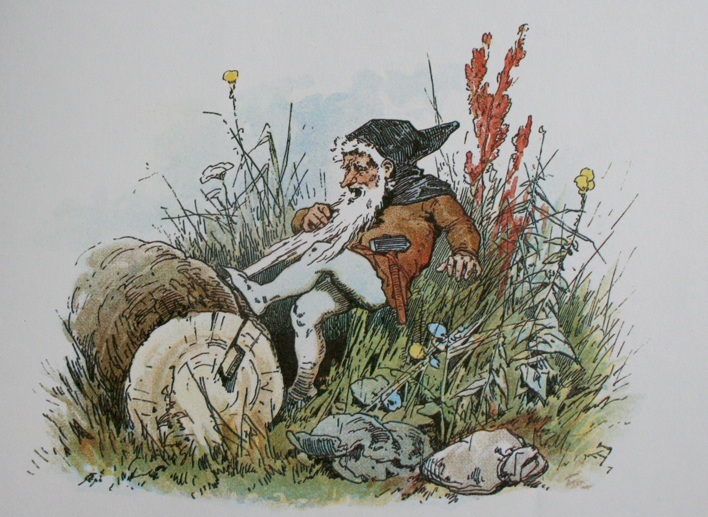 Schneeweisschen und Rosenrot; Darstellung von Alexander Zick (1845 - 1907)